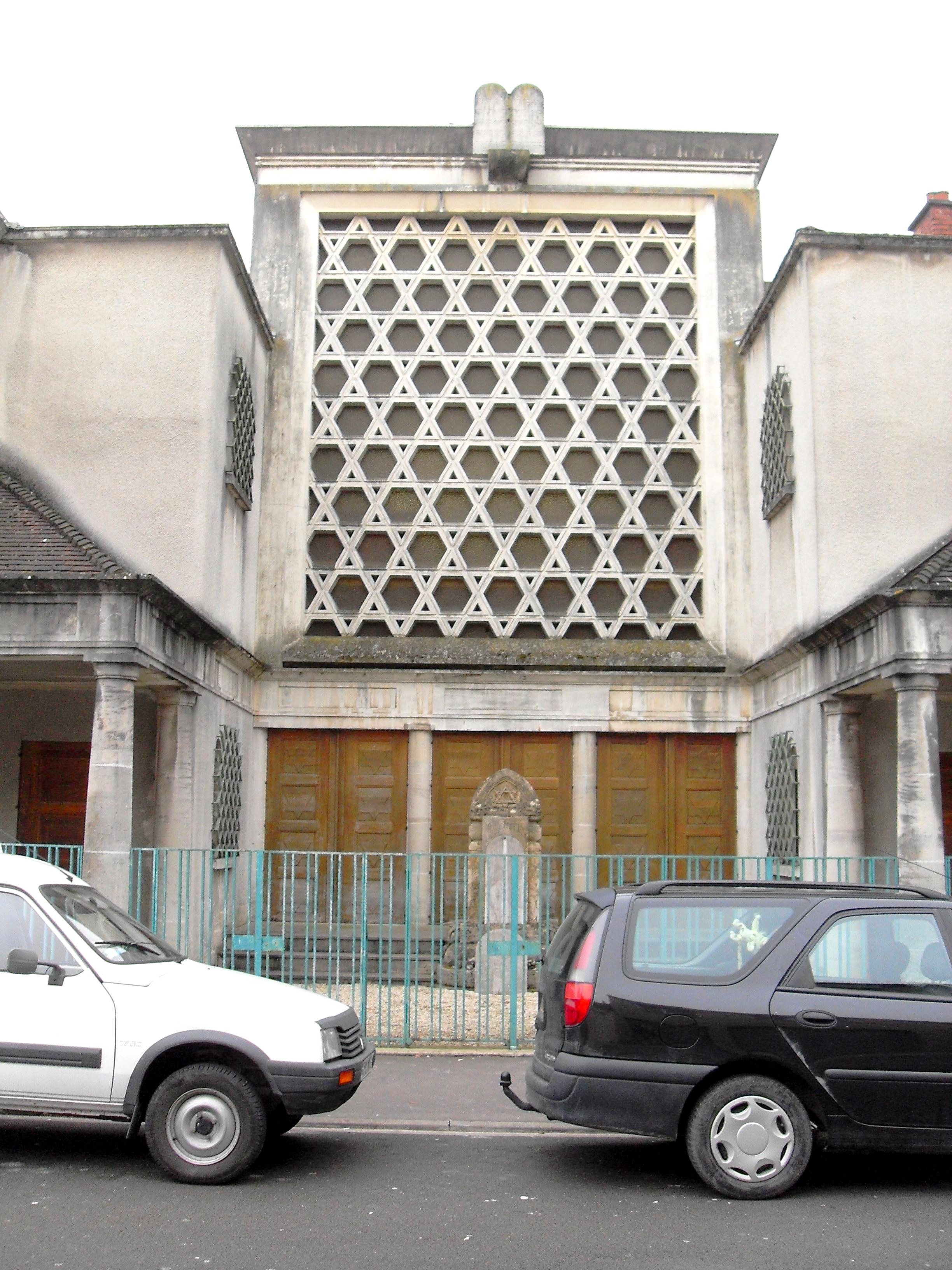 ancienne synagogue de Vitry-le-François Marne 51 (en activité jusqu'en 2007)